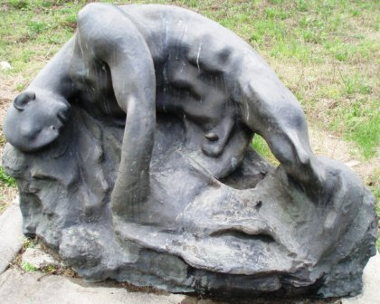 Фотографија скулптуре Матија Вуковић Рањеник 1952/53. године, из колекције Музеја Савремене уметности Београд, аутор фотографије Nicolo